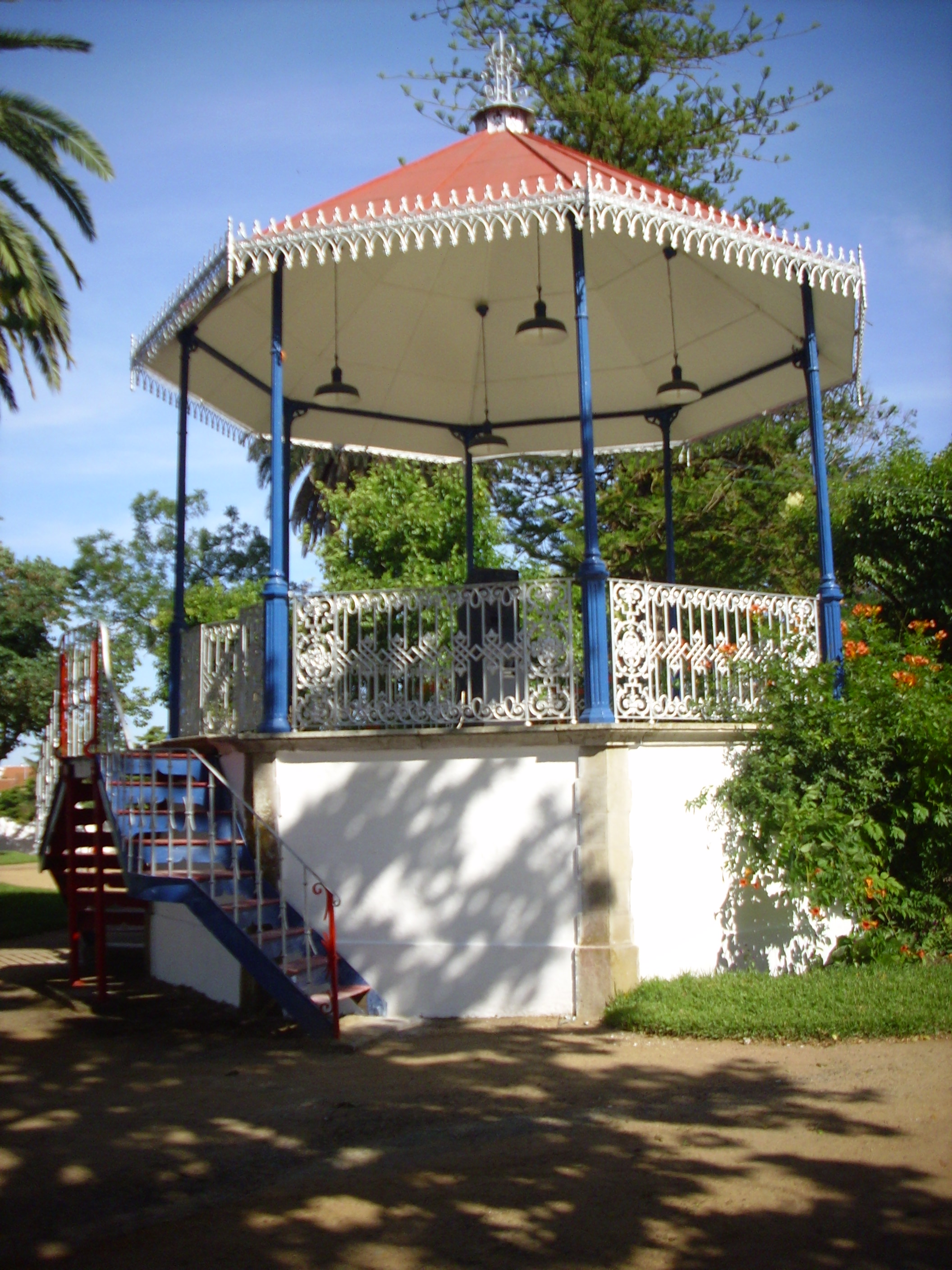 Moura